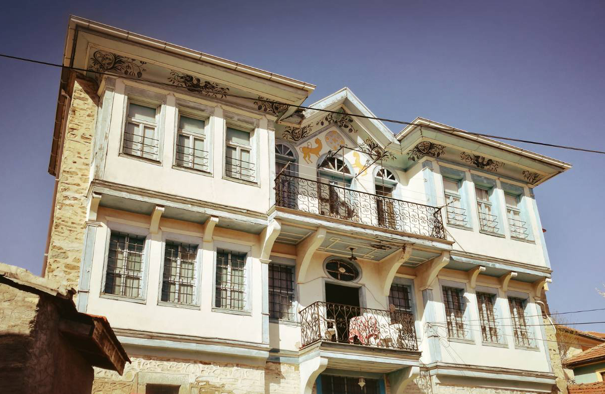 Крушевска традиционална куќа